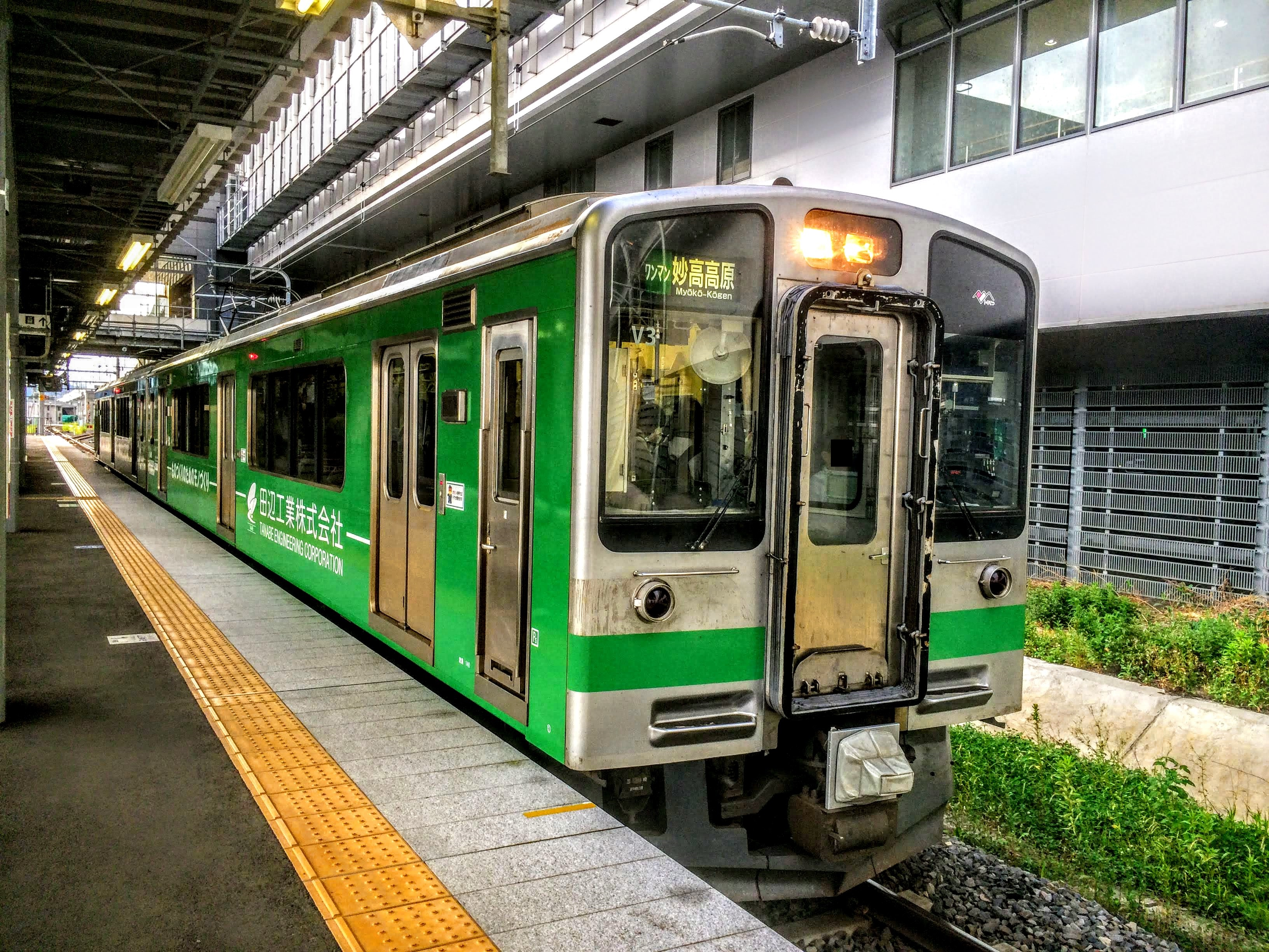 ETR上越妙高駅の1番線に停車中のET127系。